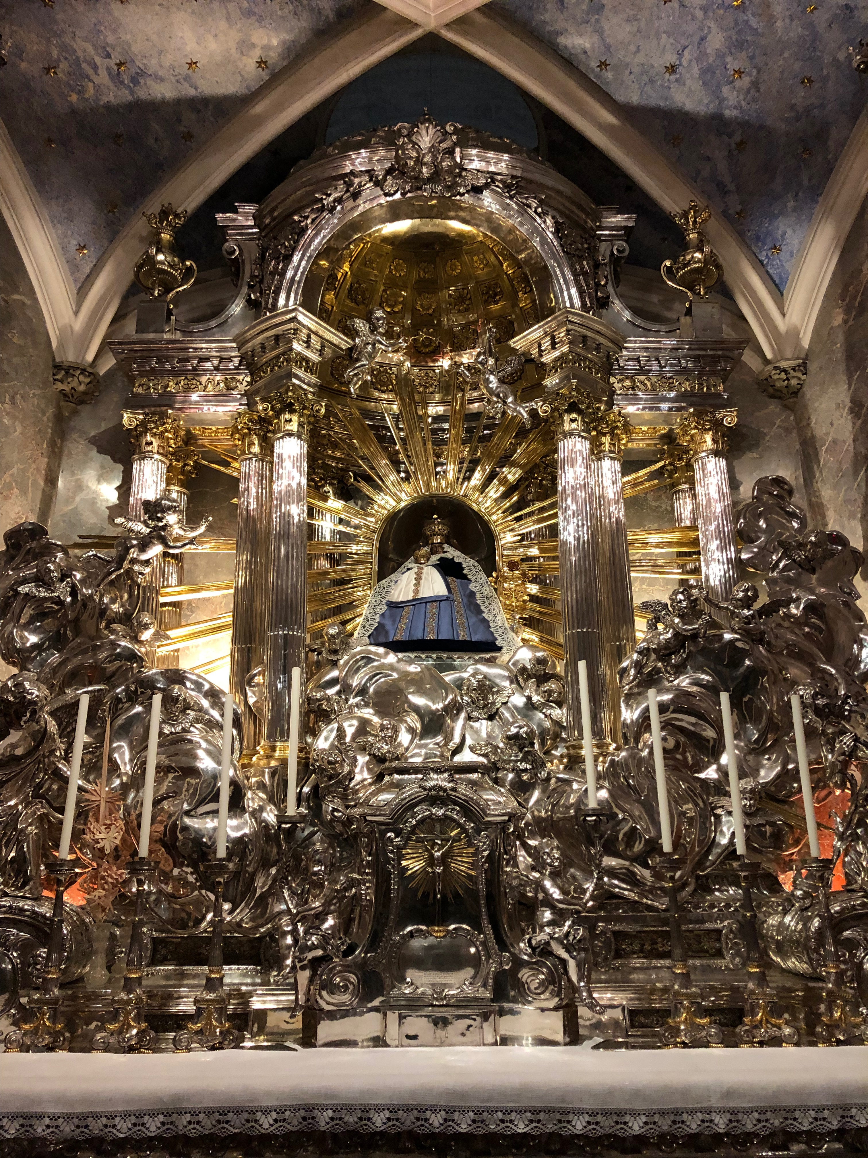 Der Mariazeller Gnadenaltar mit der Gnadenstatue bekleidet im Dirndl